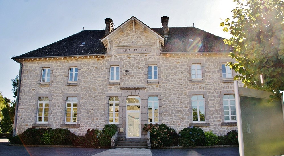 Mairie-école